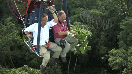 photo prise au Cameroun durant le tournage du documentaire "Les Brumes du Manengouba", vol au dessus de la canopée 2007.